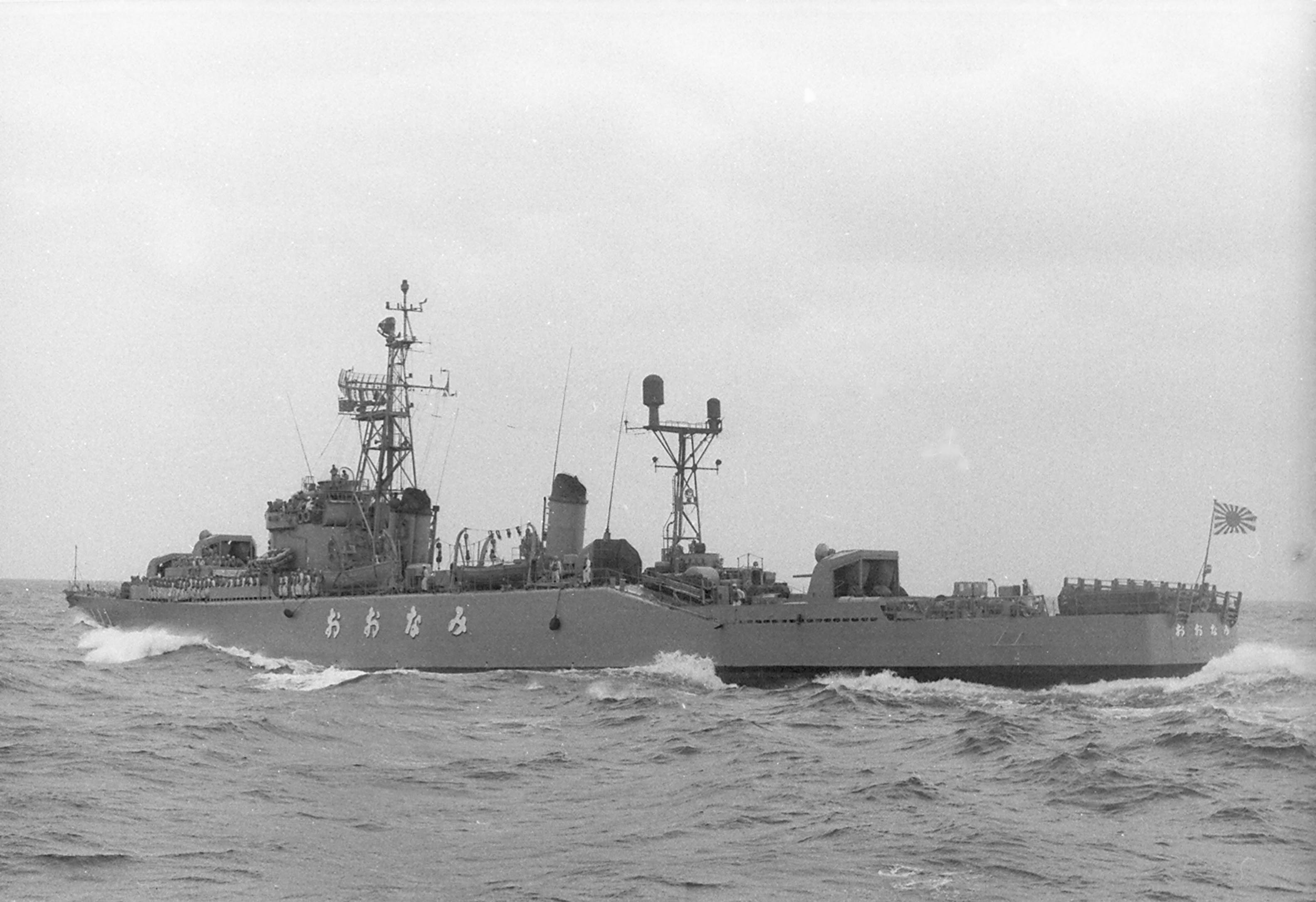 護衛艦「おおなみ」の１９６９年と思われる写真です。